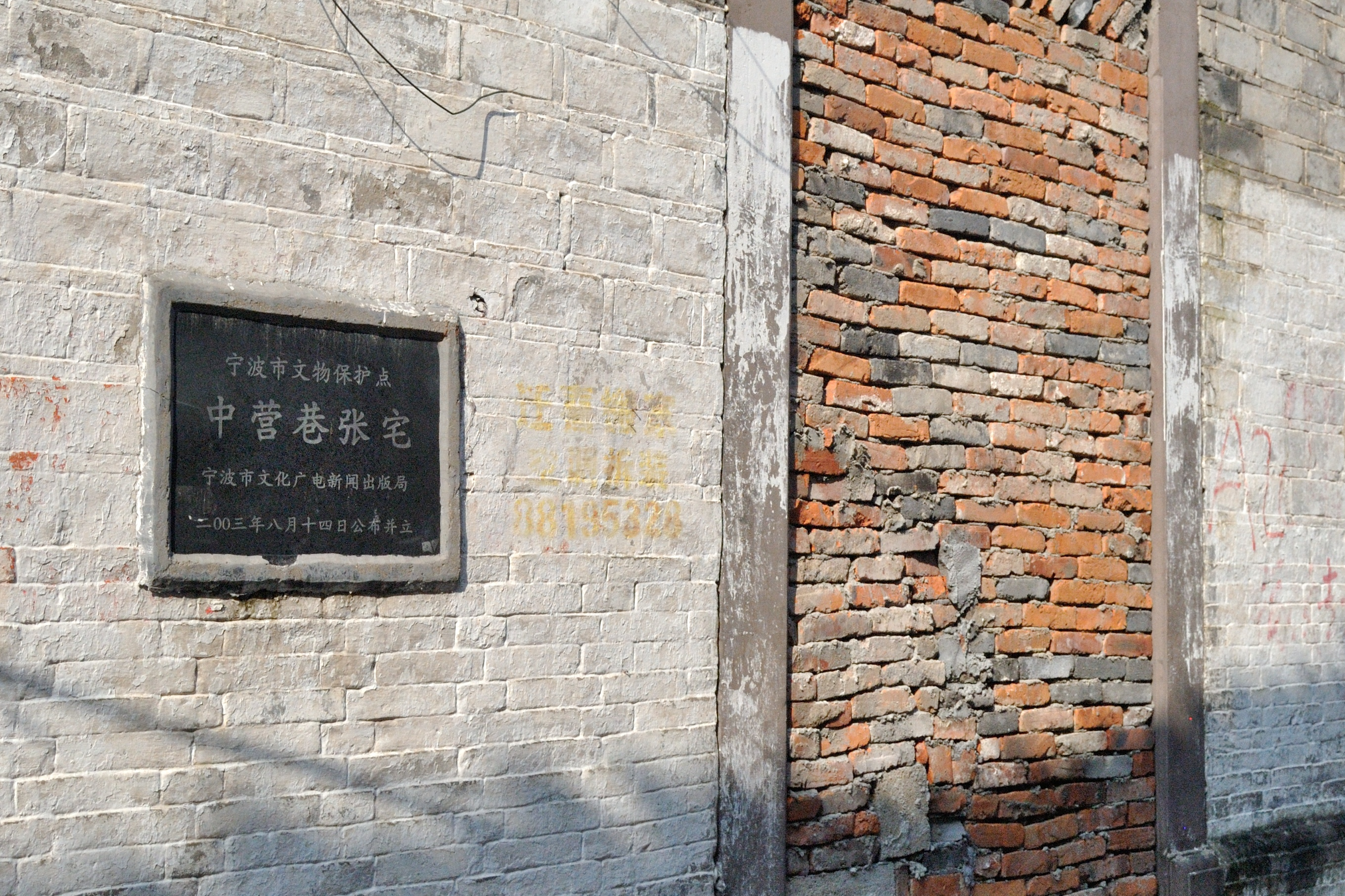 被破坏的中营巷张宅